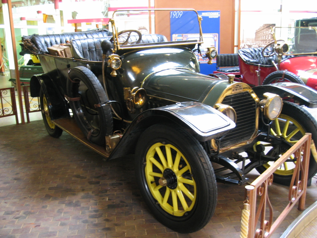 Peugeot Type 139 - Musée Peugeot Sochaux